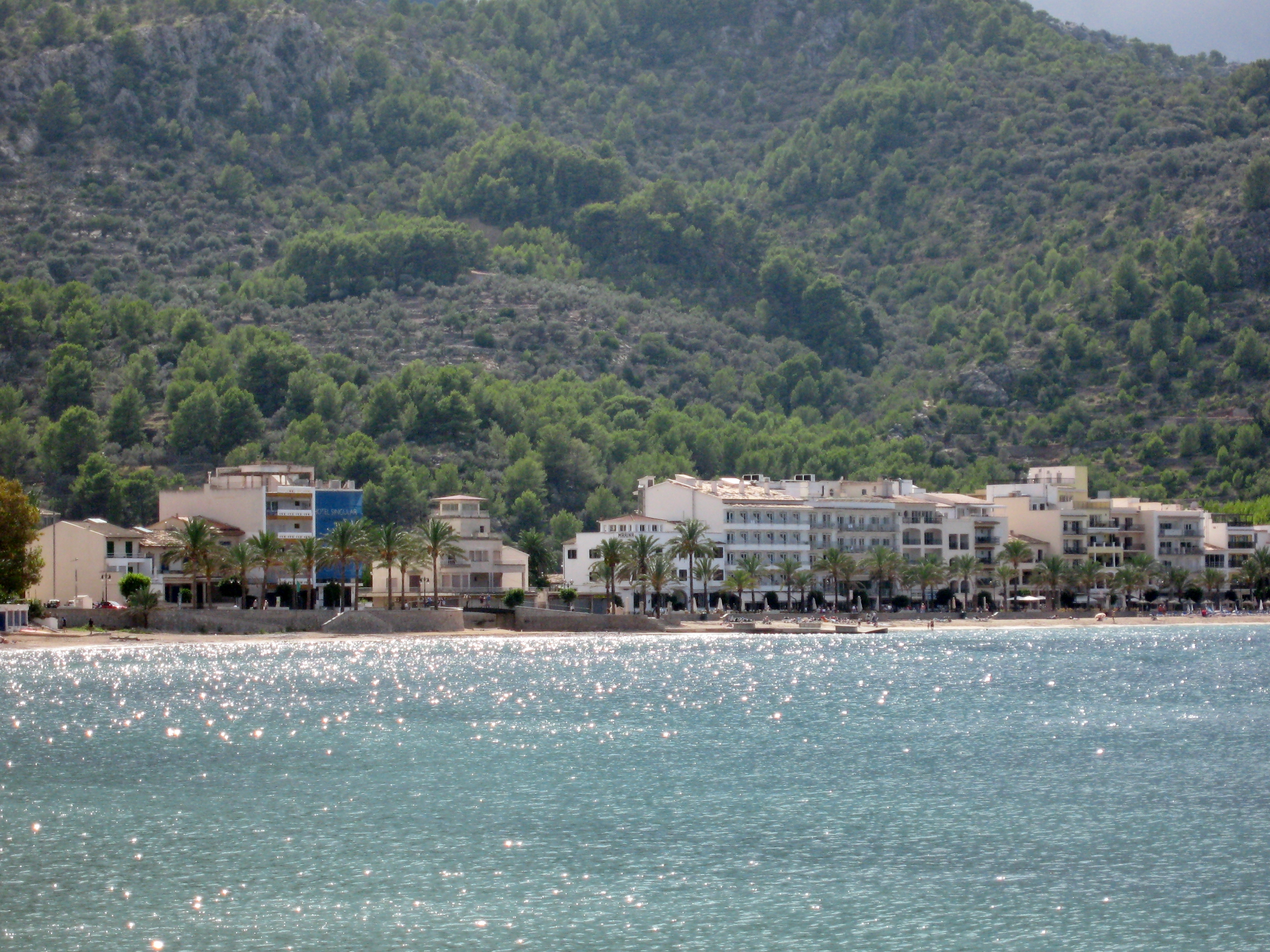 Port de Sóller, Gemeinde Sóller, Mallorca, Spanien